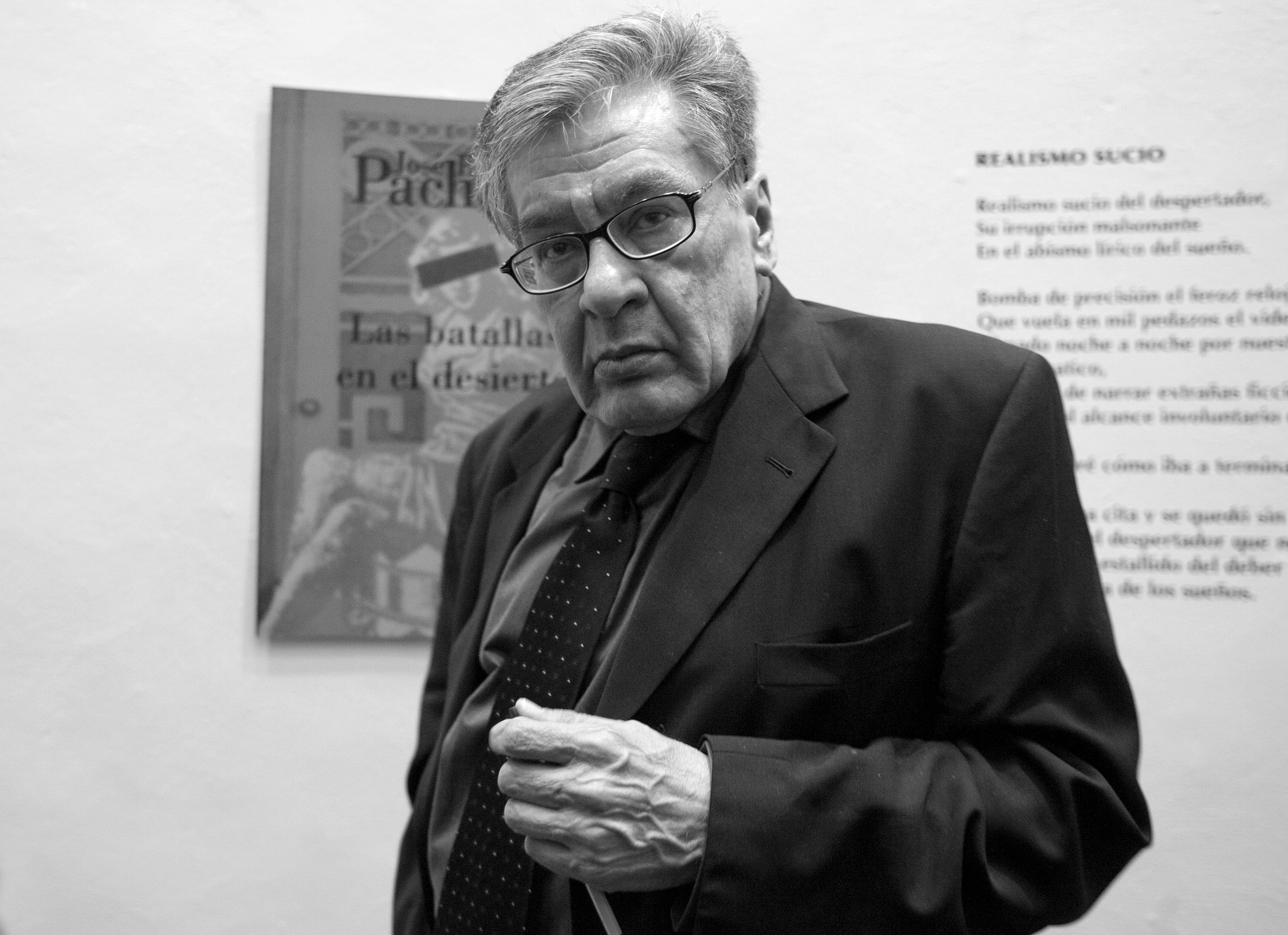 Domingo, 26 de Enero 2014. Esta tarde falleció el escritor José Emilio Pacheco de 74 años de edad en la ciudad de México a consecuencia de un paro respiratorio. Foto: Octavio Nava / Secretaria de Cultura Domingo, 26 de Enero 2014. Esta tarde falleció el escritor José Emilio Pacheco de 74 años de edad en la ciudad de México a consecuencia de un paro respiratorio. Foto: Octavio Nava / Secretaria de Cultura